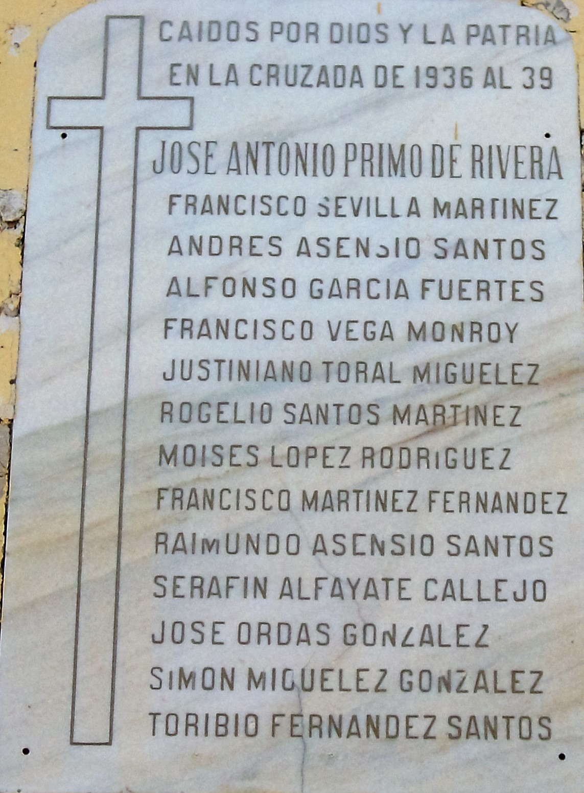 Lápida en la fachada de la iglesia de Huerga de Garaballes.